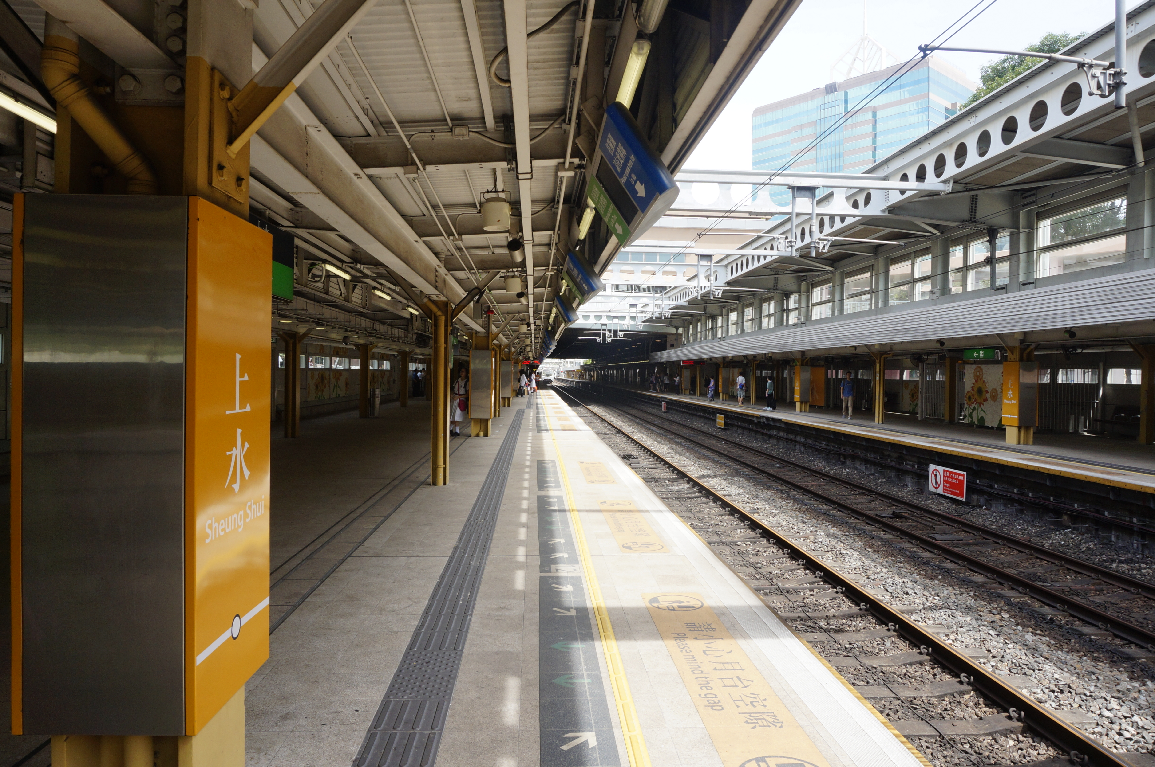 港鐵上水站月台